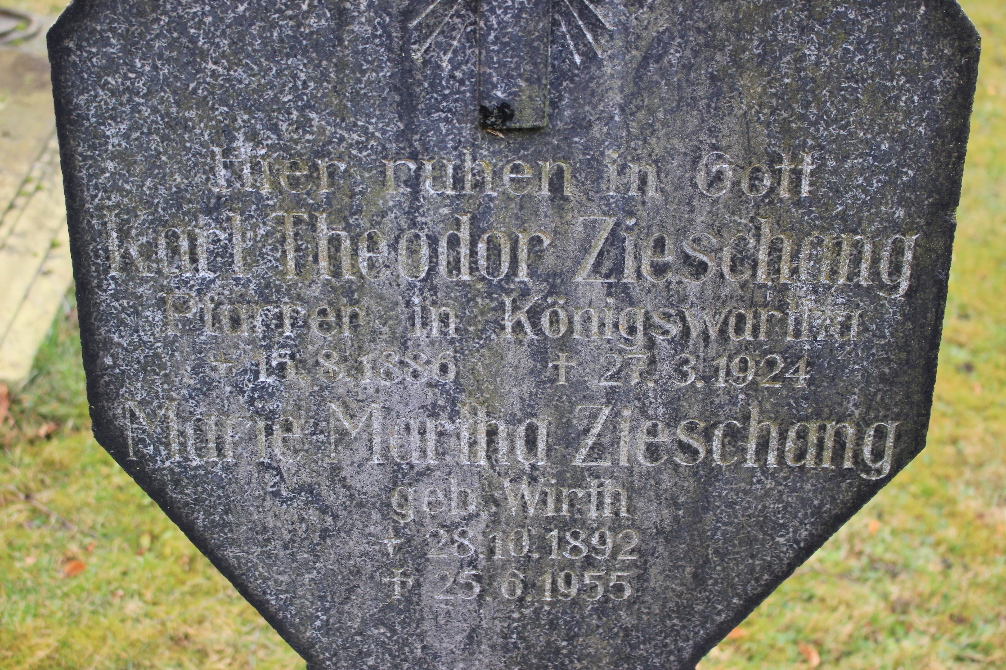 Hornjoserbsce: Narowny pomnik Korle Božidara Křižana a Marije rodź. Wirthec na starym Rakečanskim kěrchowje.